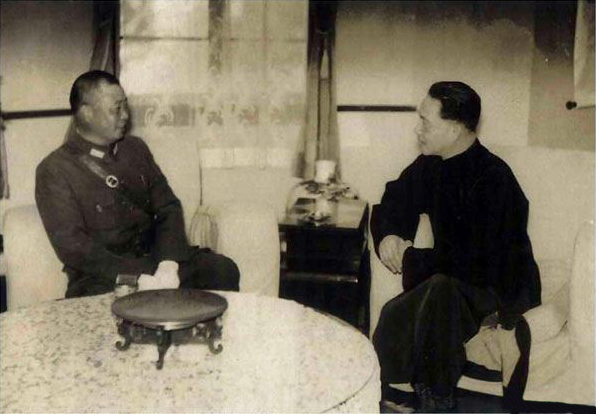 吴化文（左）在南京见汪精卫（右）。